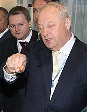 Eduard Rossel, governor of Sverdlovsk Oblast